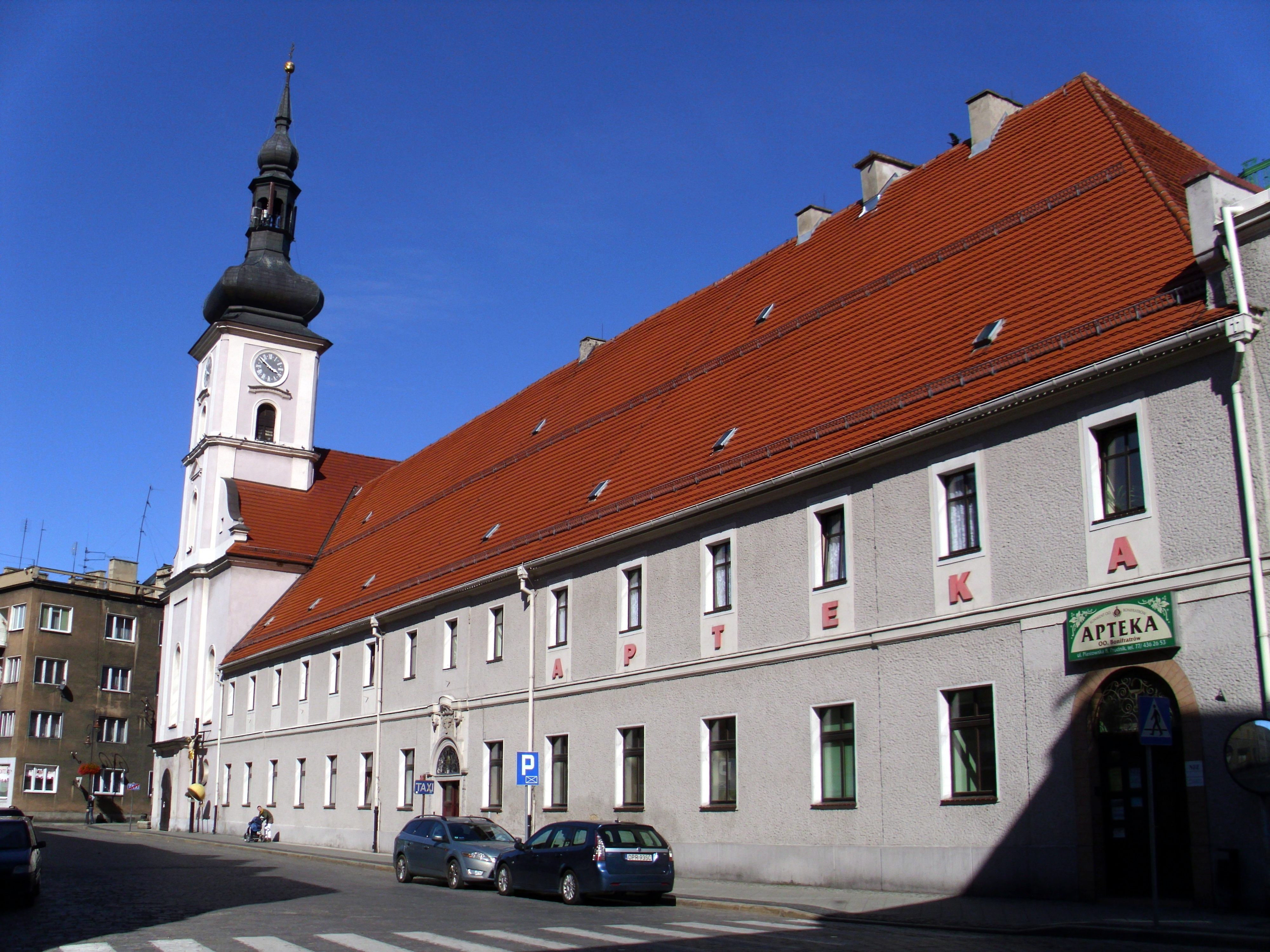 Prudnik, Zespół klasztorny bonifratrów, 1783–1787: - kościół, ob. par. p.w. śś. Piotra i Pawła, - klasztor